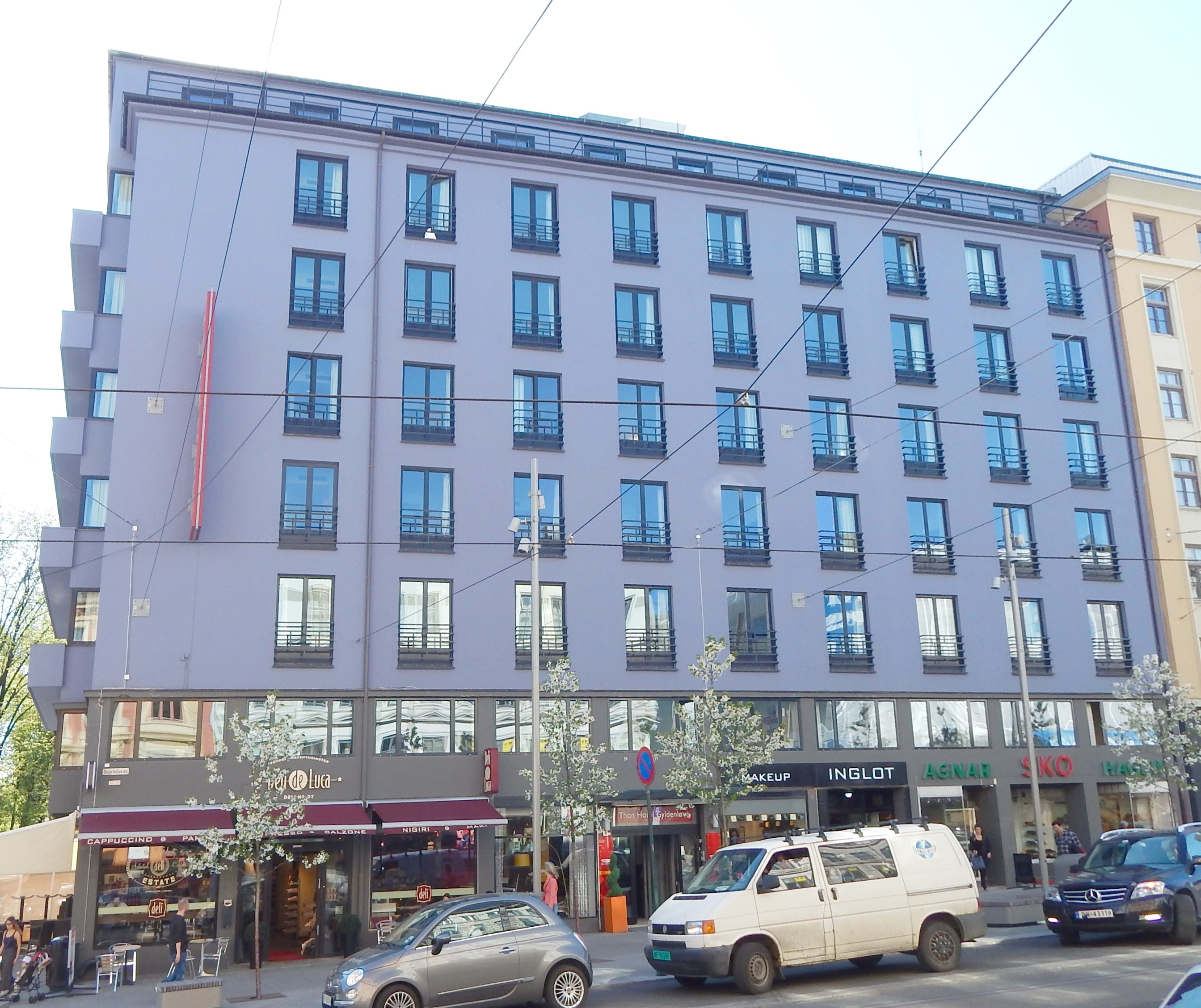 Bogstadveien 20. Arkitekt: Hj.S. Bakstad (1938).